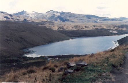 Vista de la Laguna del Otún desde La Asomadera.